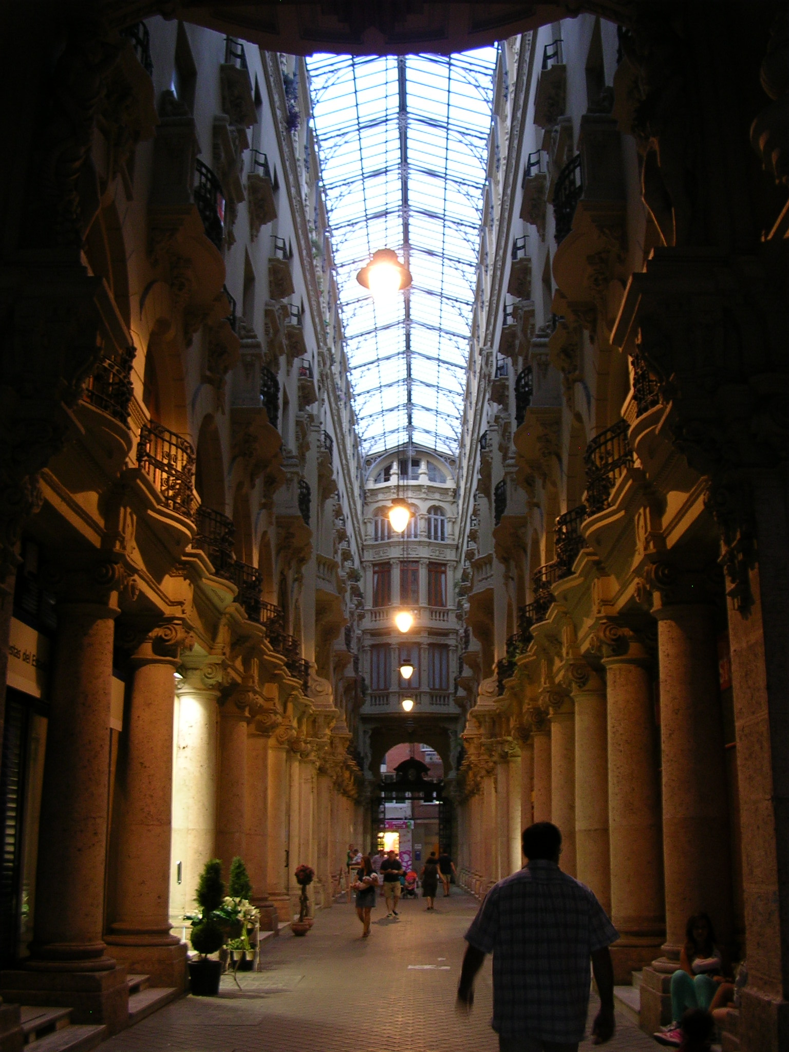 Interior completo